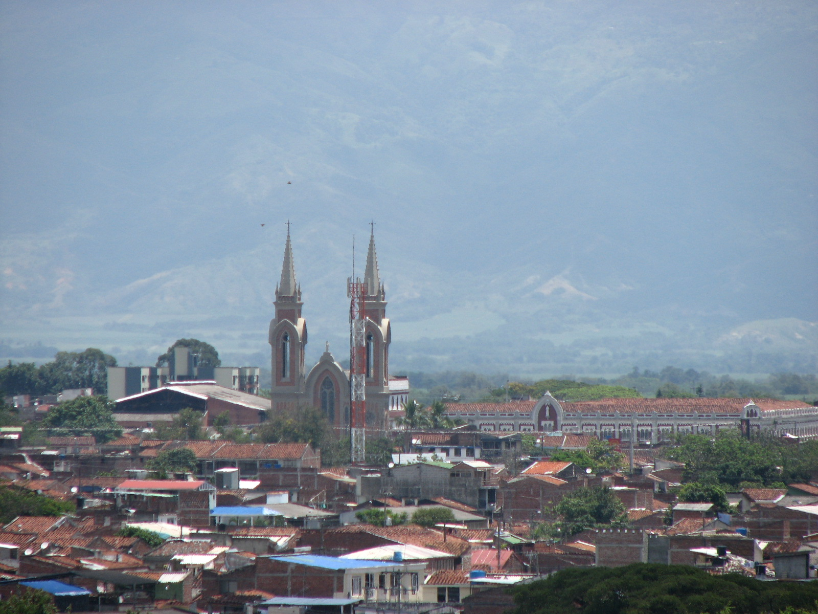 Tulua, Valle del Cauca, Colombia